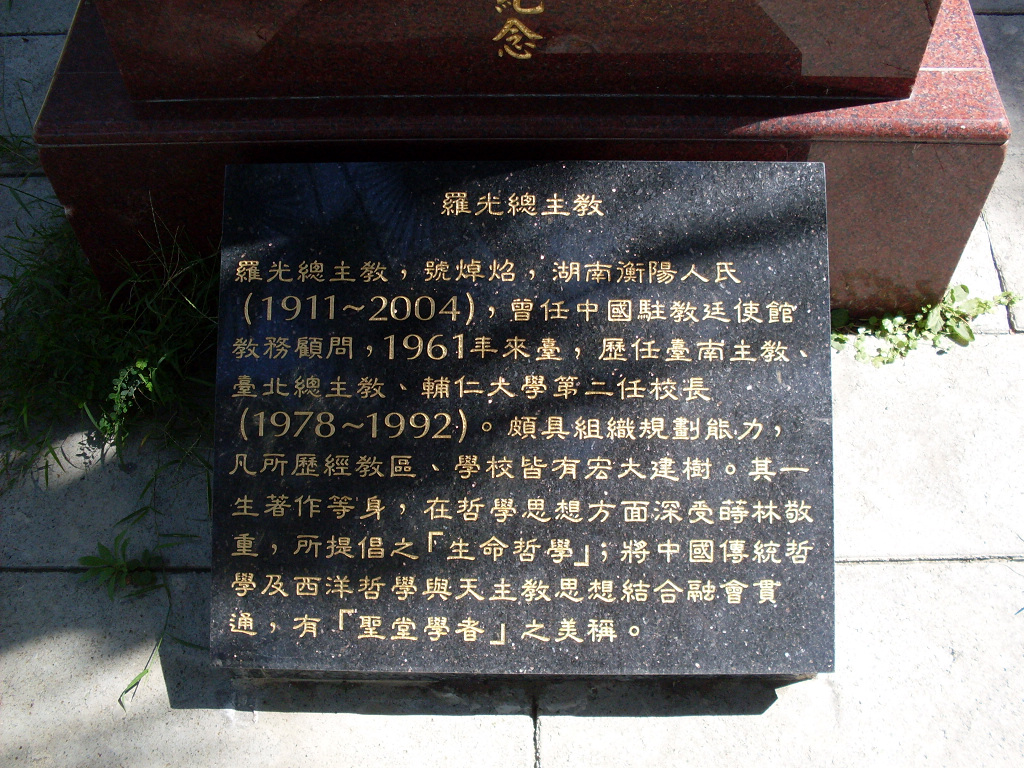 輔大灼炤館的羅光總主教胸像解說牌。